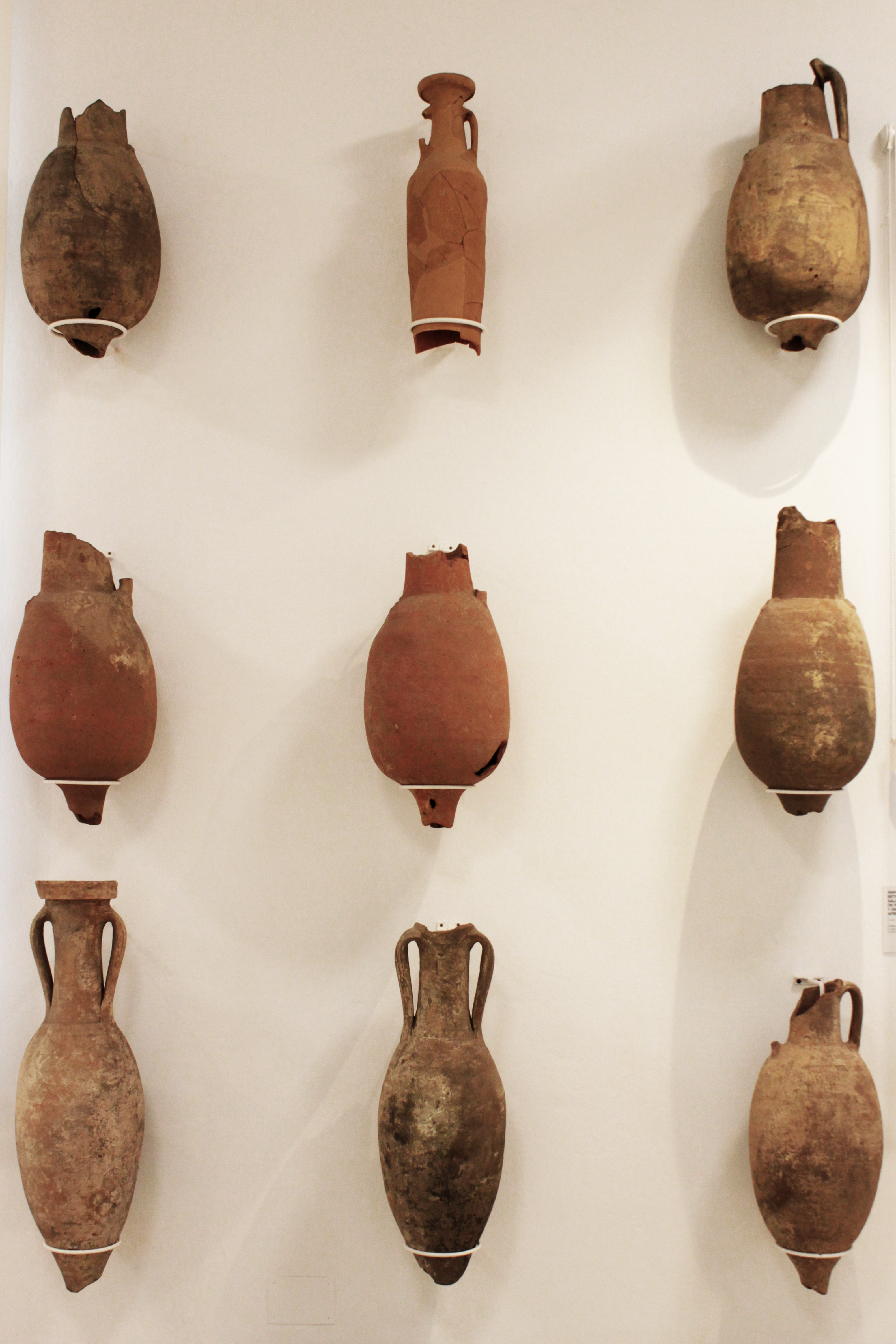 Ánforas béticas y africanas para el transporte de salazones de pescado datadas entre los siglos I y IV d.C. localizadas en las factorías de salazones de la Calle San Nicolás y en los hornos romanos de El Rinconcillo de Algeciras. Museo municipal de Algeciras, Andalucía, España.